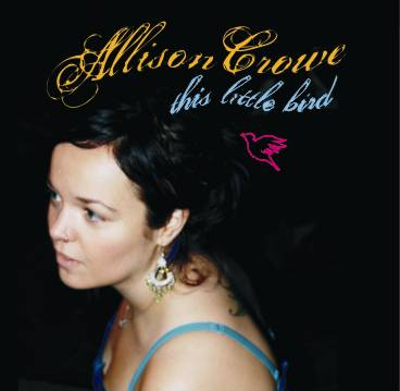 This Little Bird - Allison Crowe 2006 album cover artwork; photo by Billie Woods Image:AllisonCroweThisLittleBird.jpg